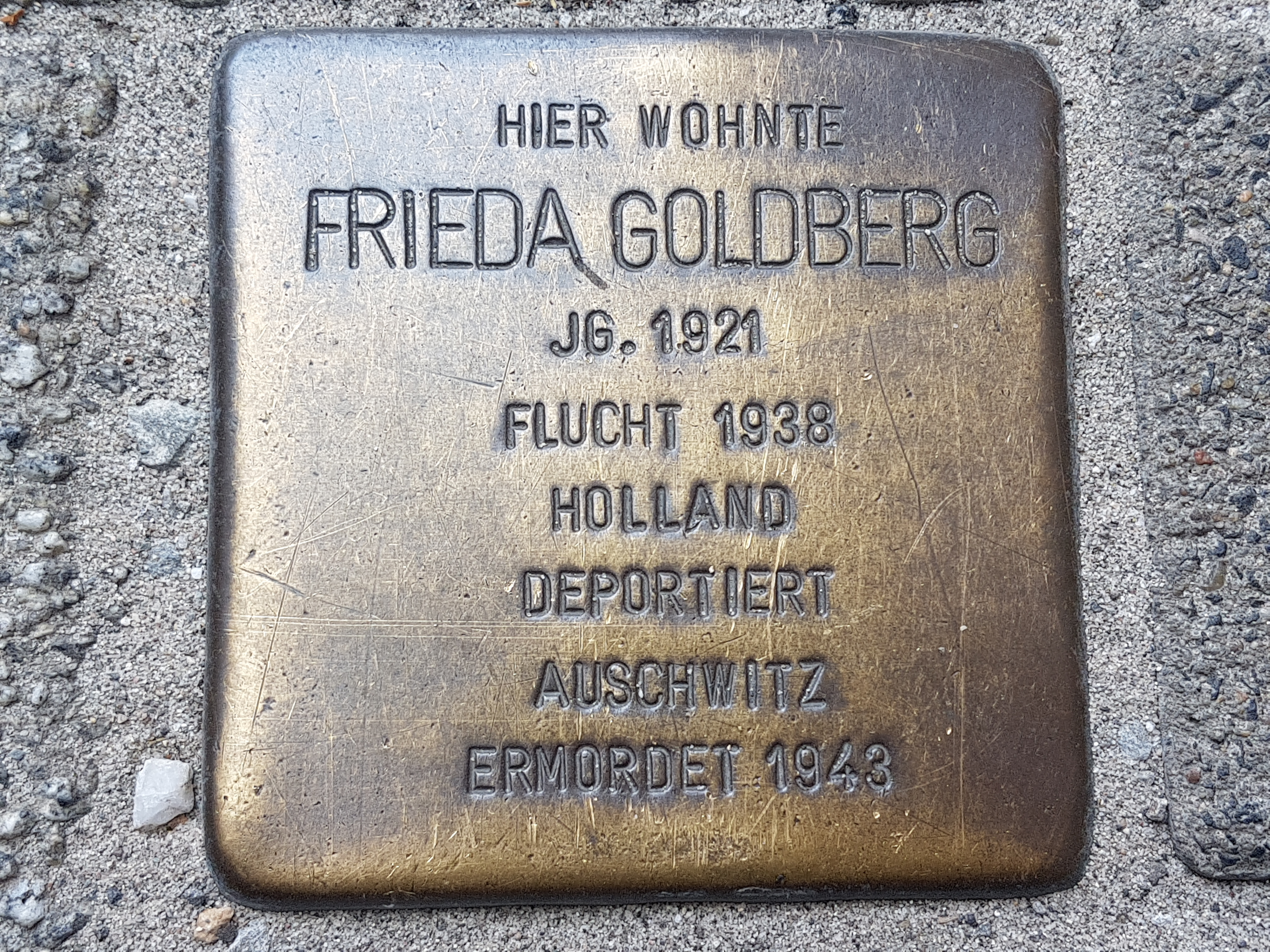 Frieda Goldberg Stolperstein Duisburg